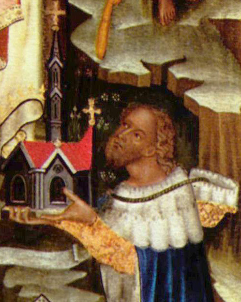 Peter I. von Rosenberg